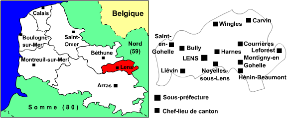 Carte de l'arrondissement de Lens (62) avec chefs-lieux de cantons Utilisateur:Manchot sanguinaire